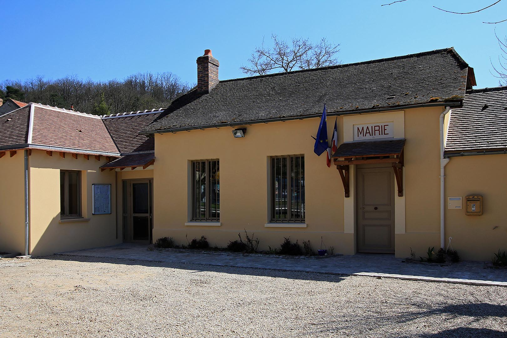 Mairie de Fontaine la Rivière